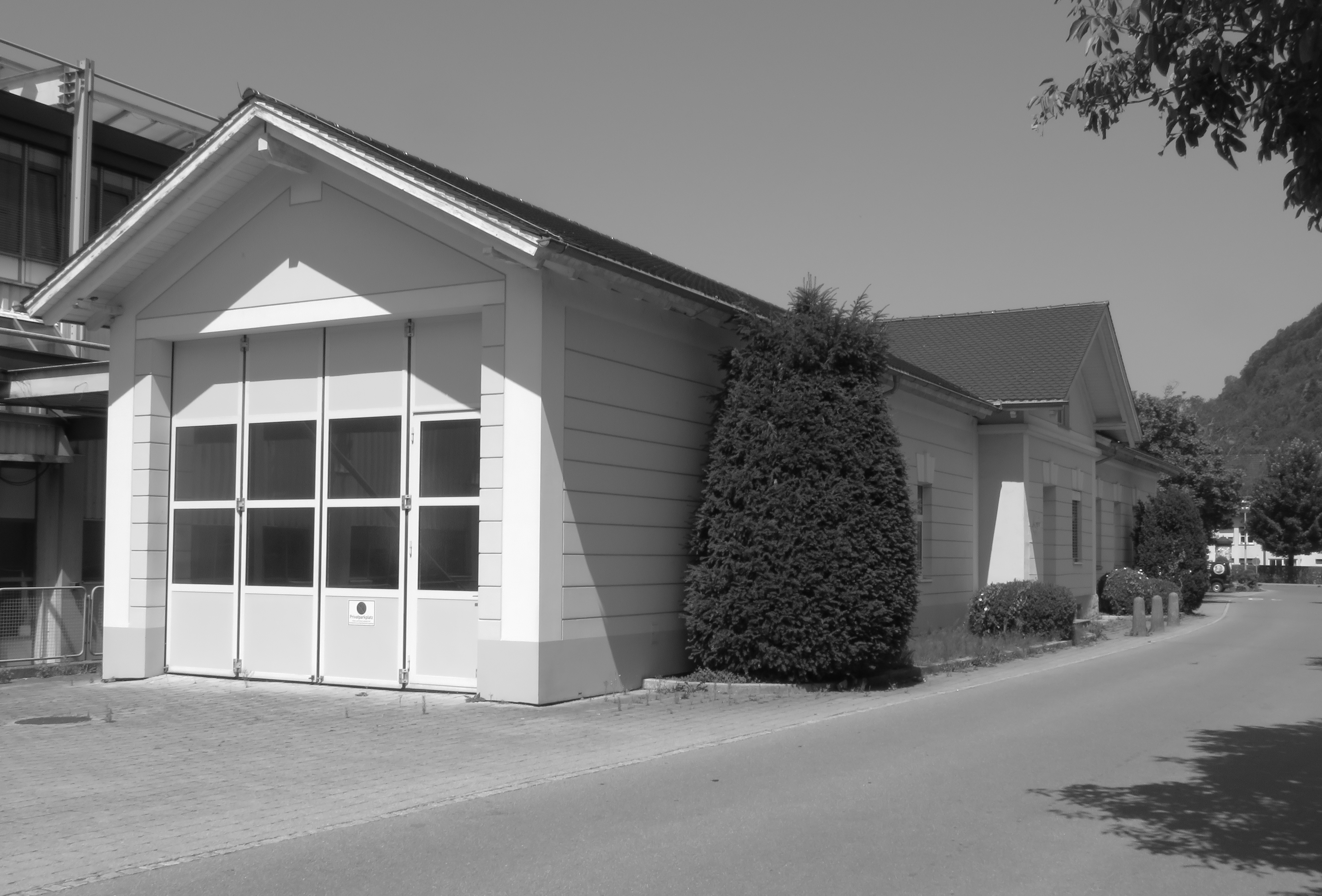 Ehemalige Abstellhalle der Bregenzerwaldbahn in Kennelbach